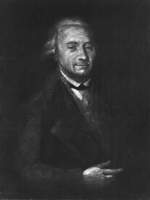 Melchiorre Cesarotti's Portrait